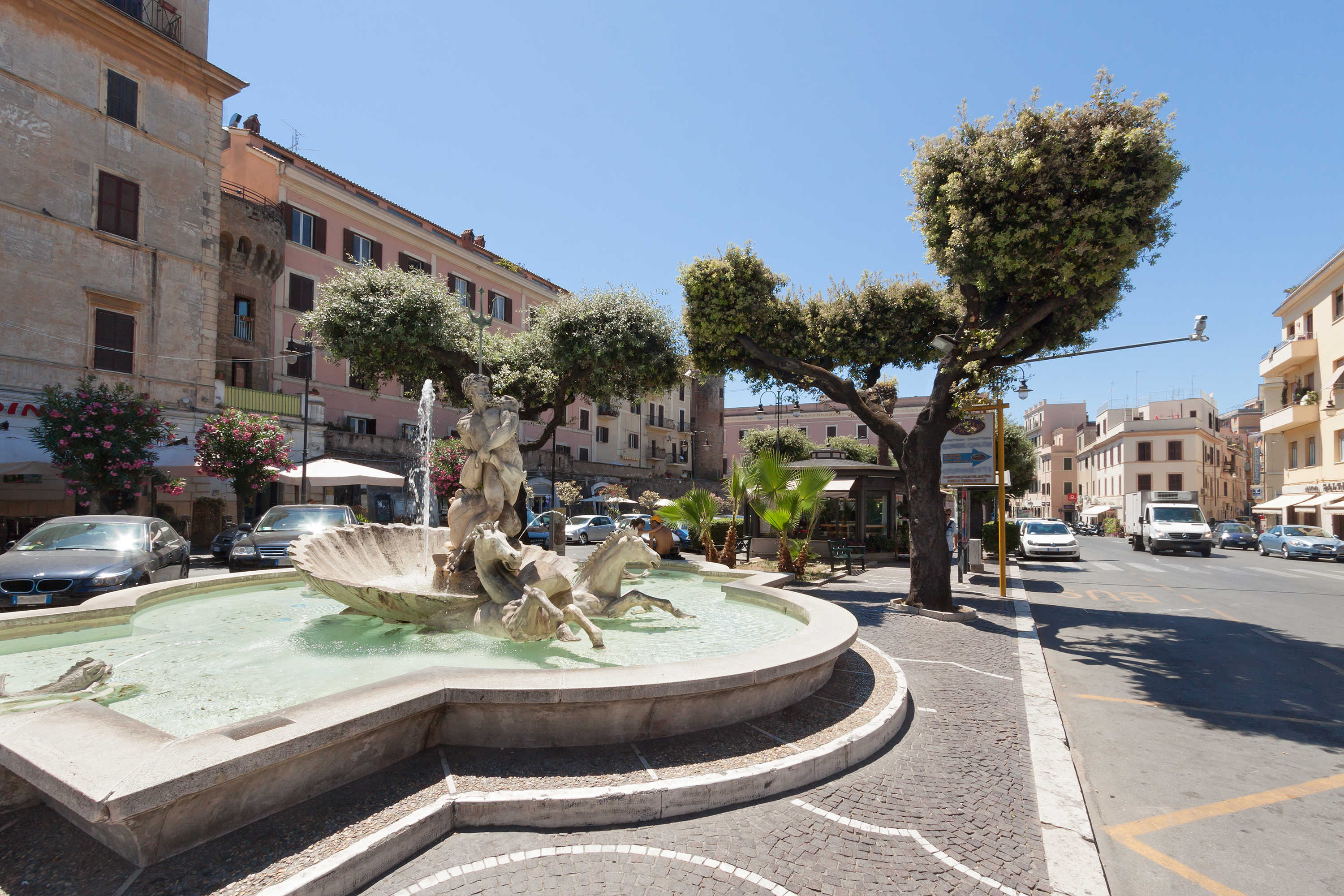 Неттуно пьяцца Дж Мазини с фонтаном Нептуна